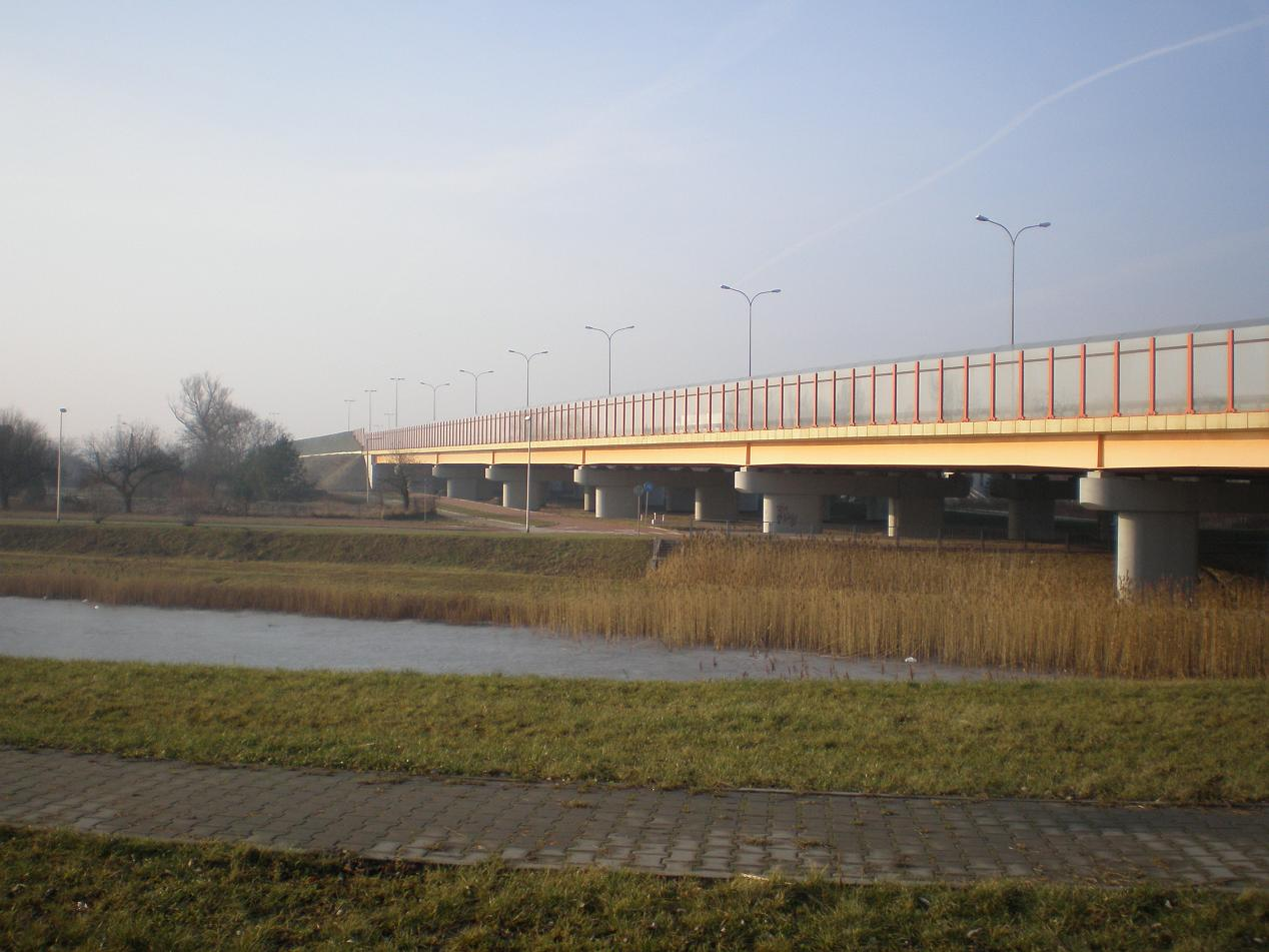 Trasa Siekierkowska. Zdjęcie zrobione ze ścieżki rowerowej biegnącej wzdłuż Trasy siekierkowskiej.